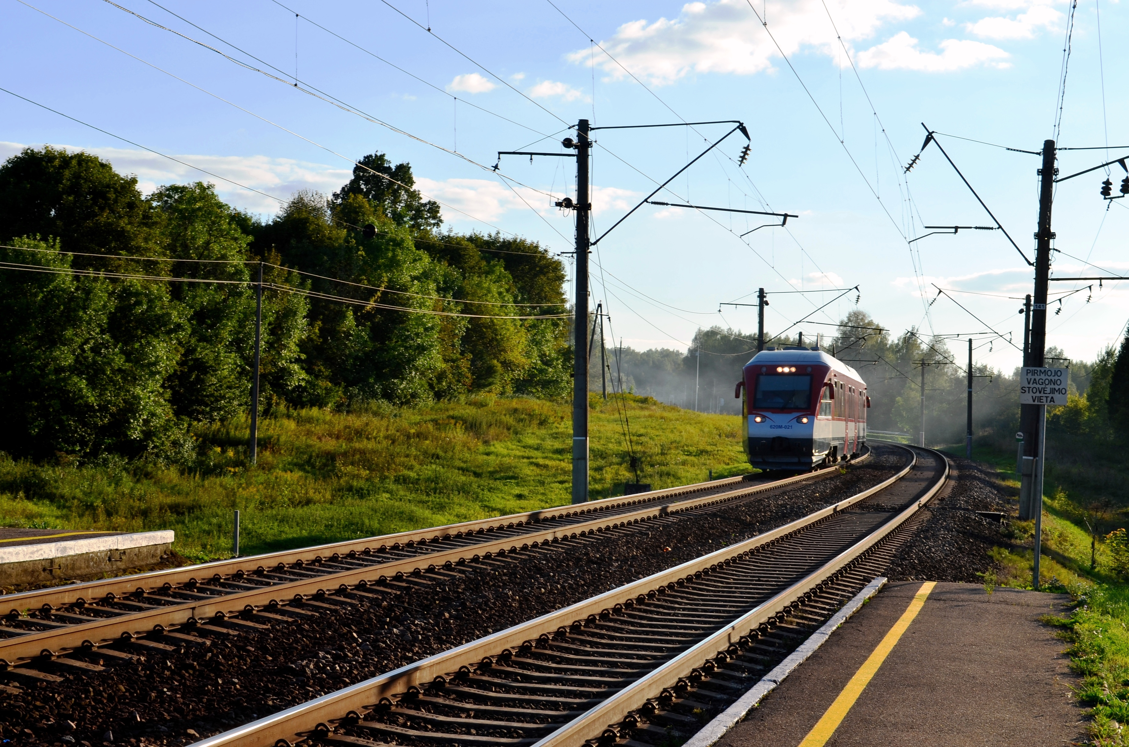 Traukinys Kaunas-Naujoji Vilnia, Žemasis Pavilnys, Vilnius